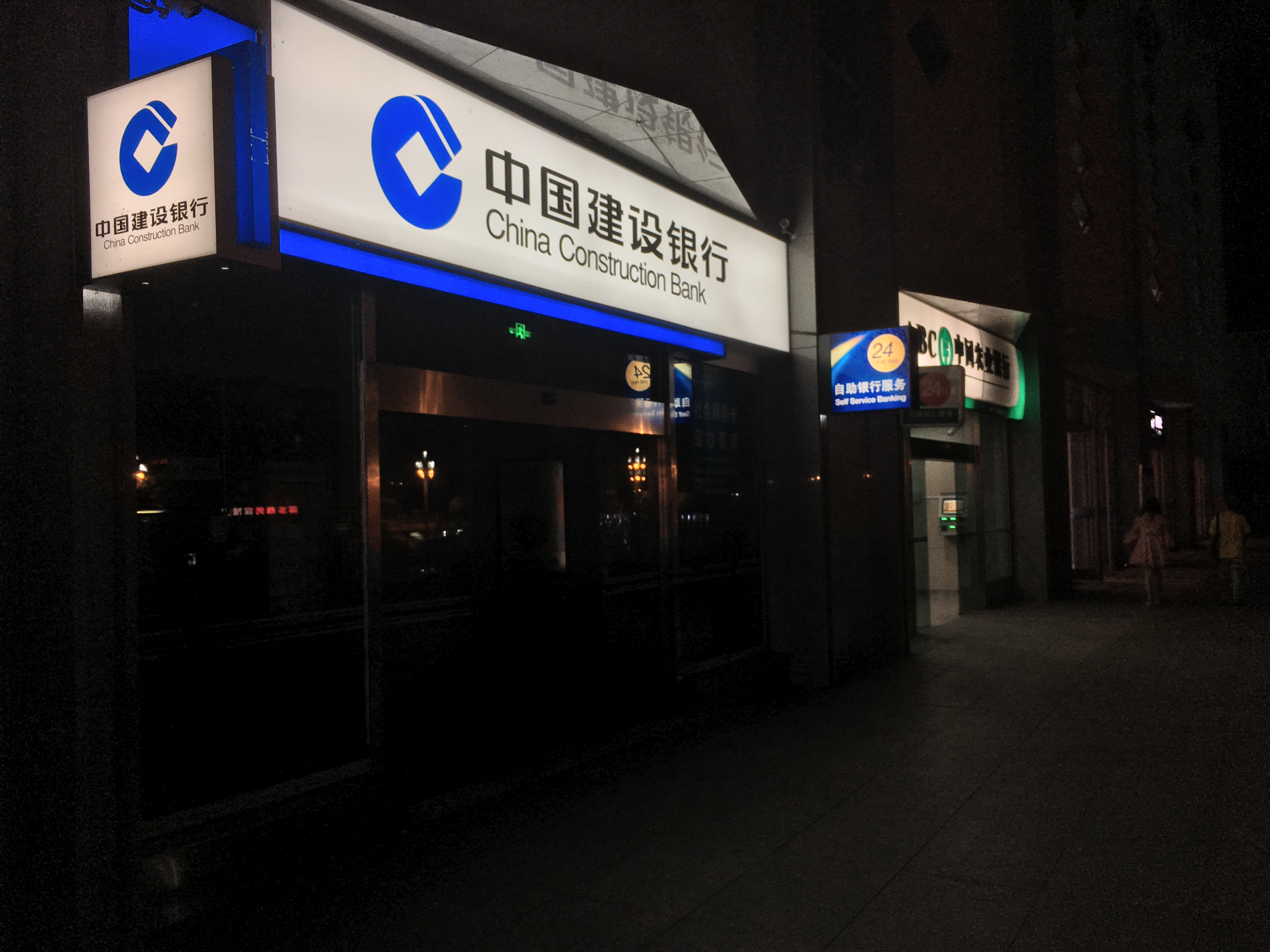 iphone se拍摄